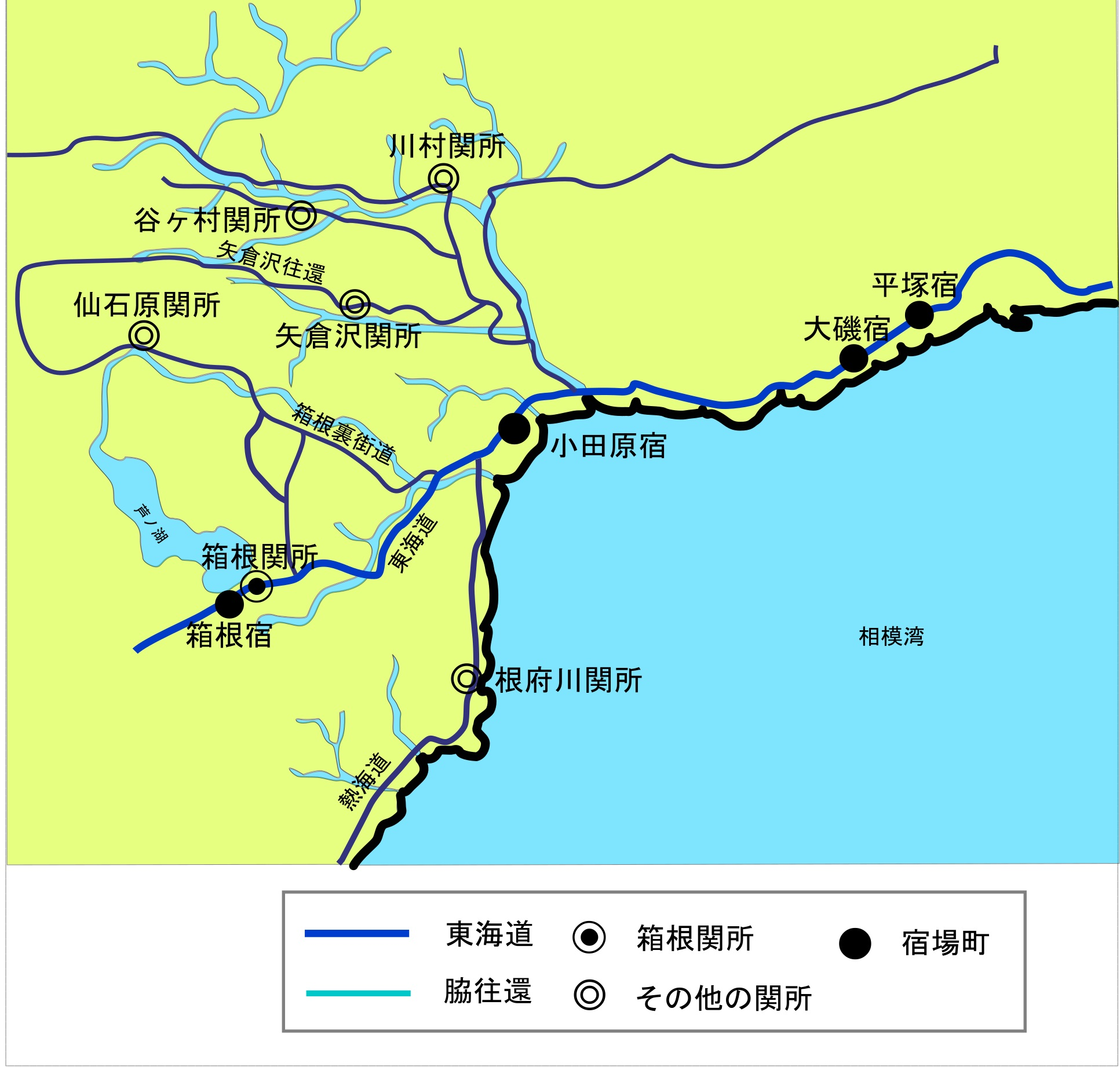 箱根関と東海道・脇往還の位置関係。